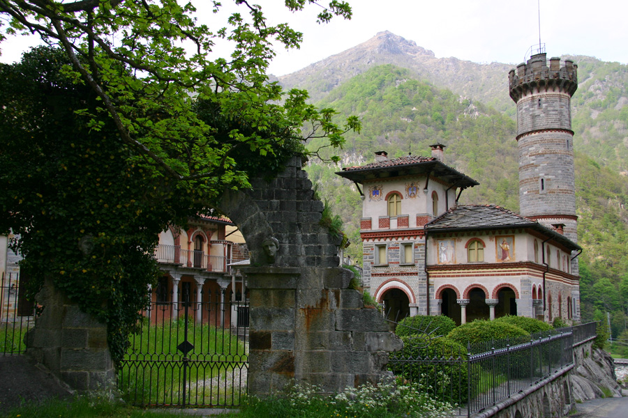 Il castello di Rosazza (BI). In primo piano l'arco di accesso al giardino.